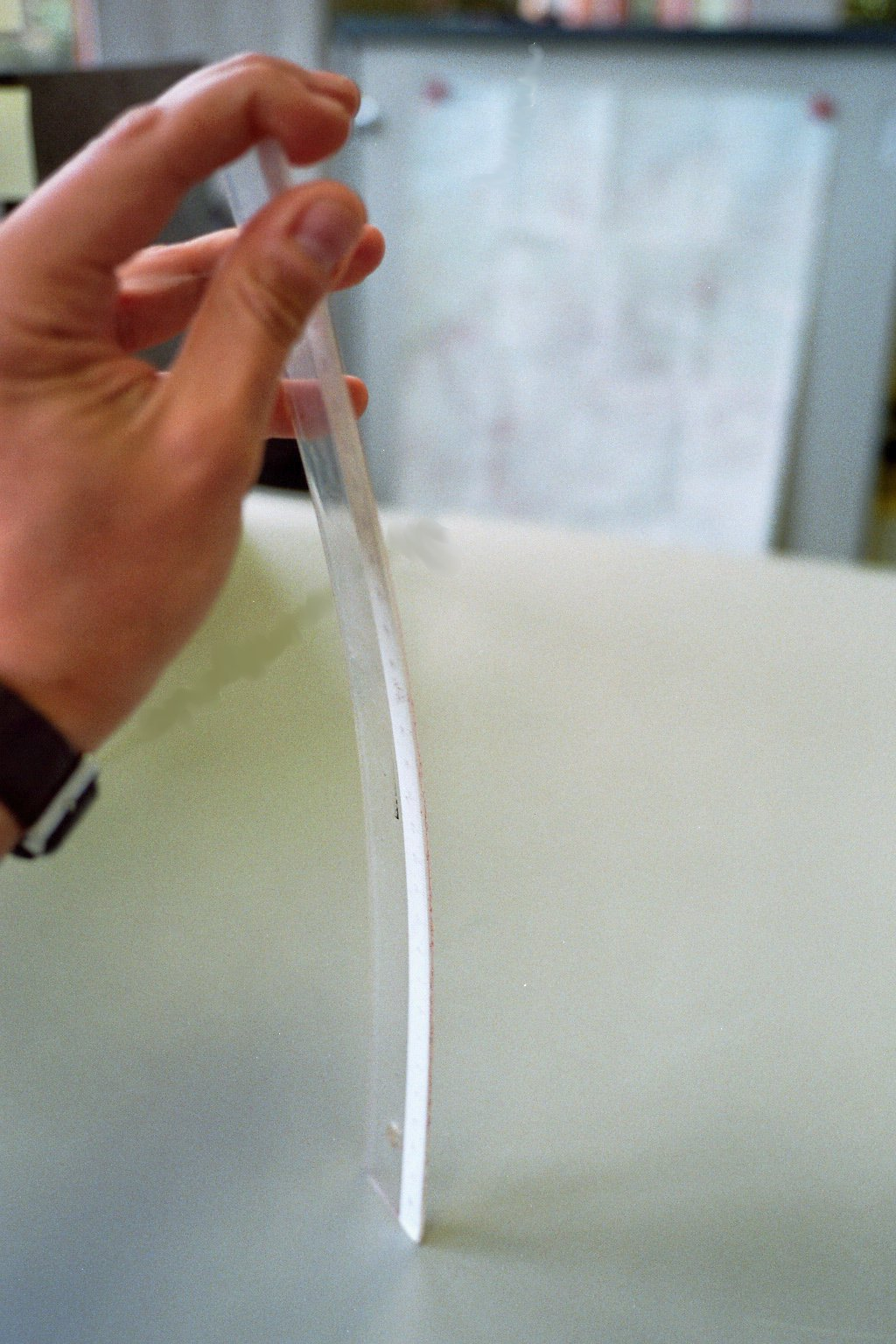 Ein unter Last ausknickendes Lineal aus Kunststoff